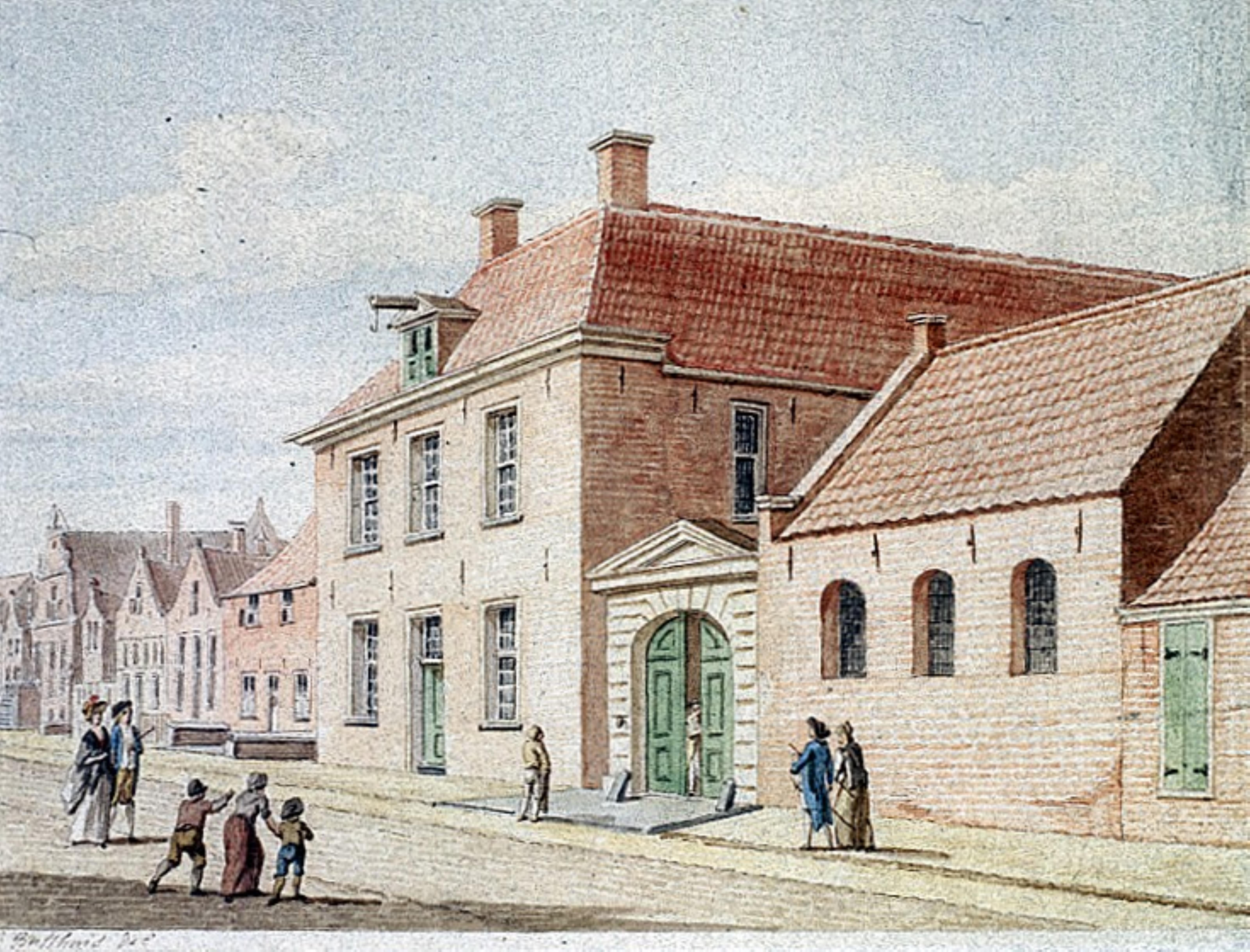 Stadswerkhuis oostzijde Haddingestraat. "Werkhuys voor beedelaren en Diaconiearmen in de Haddingestraat gesticht in den teegenwoordige Jaare 1786 binnen Groningen". In 1796 alweer opgeheven en vervolgens weer afgebroken.